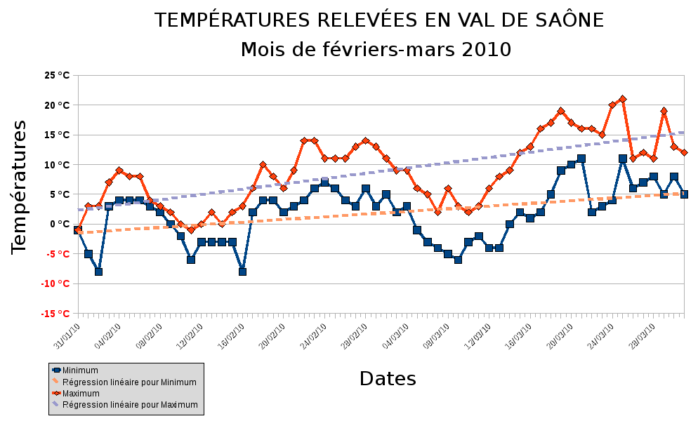 Graphiphe représentant les températures relevées en Val-de-Saône (Côte d'Or, Bourgogne, France)